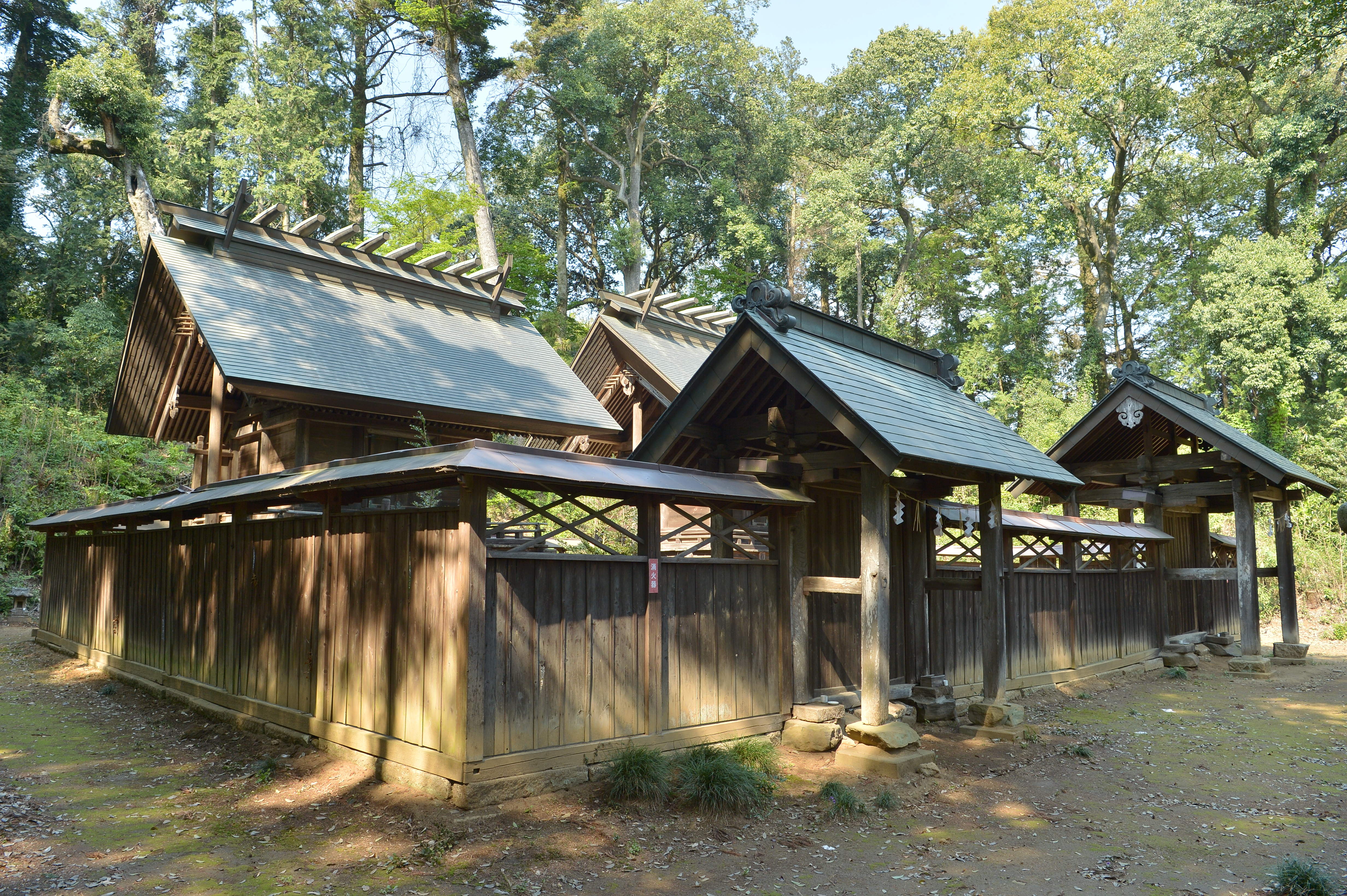 内外大神宮の内宮本殿と外宮本殿 附属・内宮御門と外宮御門。茨城県筑西市に所在。